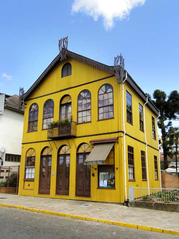 Centro Histórico de Antônio Prado - Casa Antonio Bocchese, conhecida como Casa da Neni, rua Luiza Bocchese, 34. Construída em 1910 para Antonio Bocchese como residência na parte superior e oficina de ourivesaria no térreo. Sua filha Joana Magdalena, conhecida como Neni, herdou a casa e nela instalou uma loja de objetos variados, inclusive religiosos, por isso ela ficou conhecida como a Casa da Neni.[1]